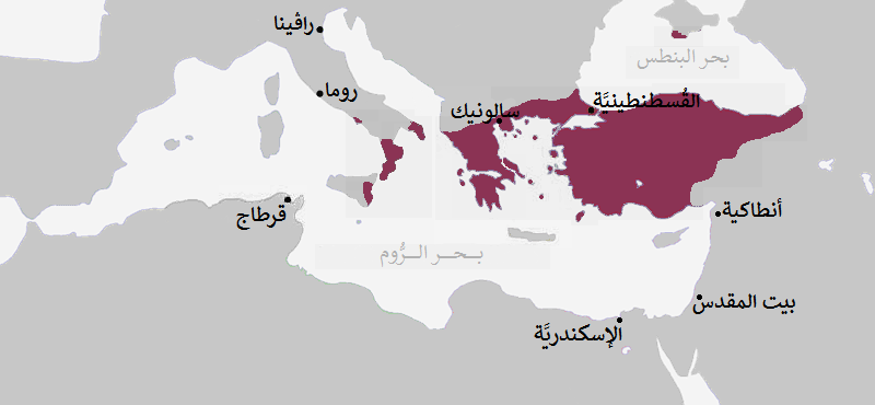 الإمبراطوريَّة البيزنطيَّة، حوالي سنة 867م.